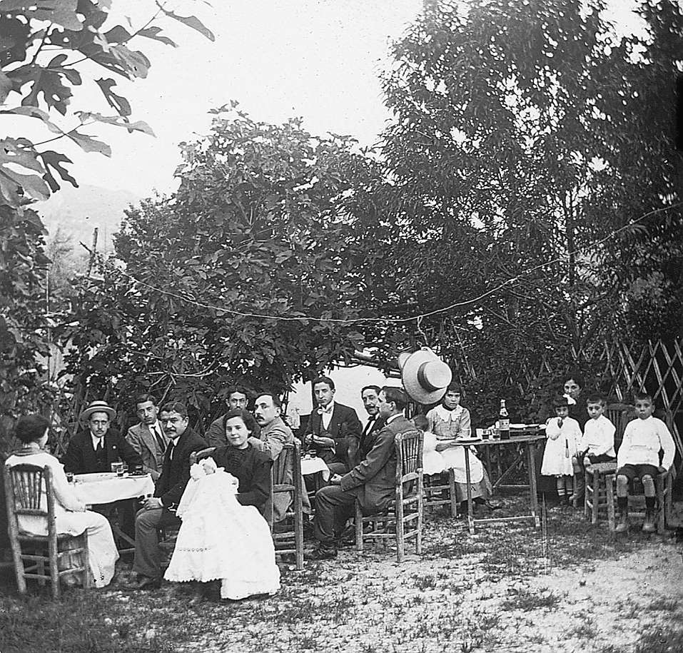 Fotografía de grupo en un bautizo (década de 1910). Merendero de La Glorieta